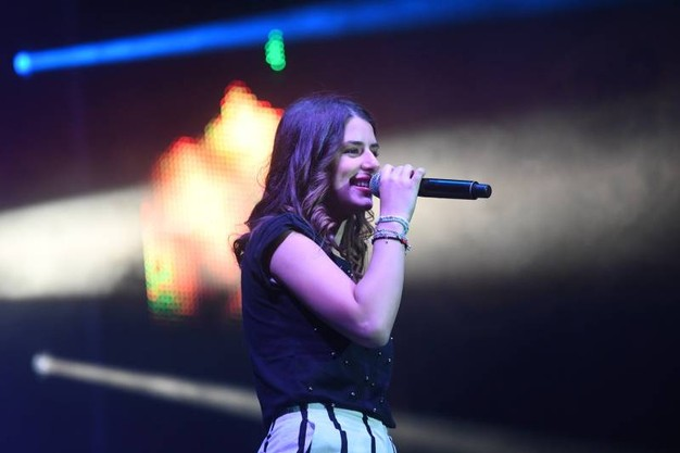 federica carta che canta a bologna